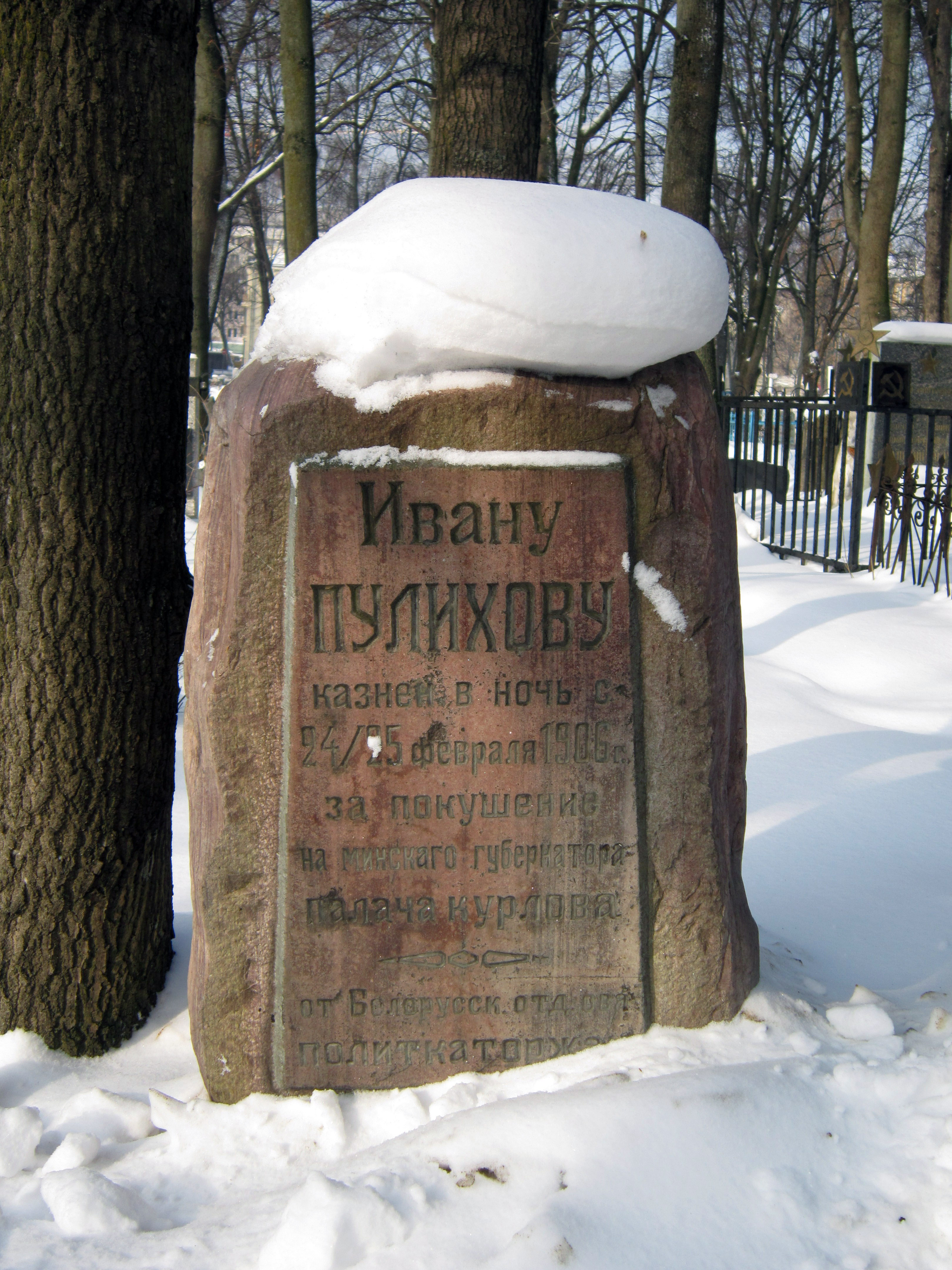 Могила Ивана Петровича Пулихова. Военное кладбище, Минск.